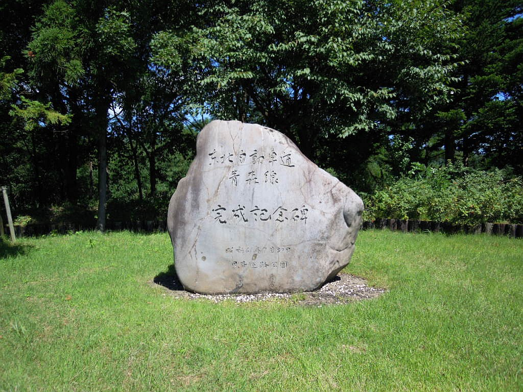 東北自動車道小坂パーキングエリア上り線にある東北自動車道青森線完成記念碑